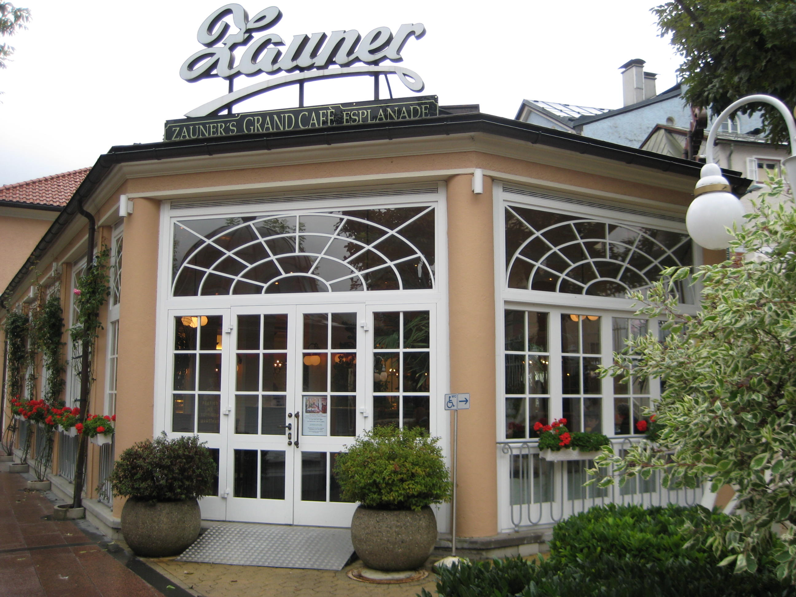 Konditorei Zauner: Das Grand Café Esplanade an der Esplanade in Bad Ischl